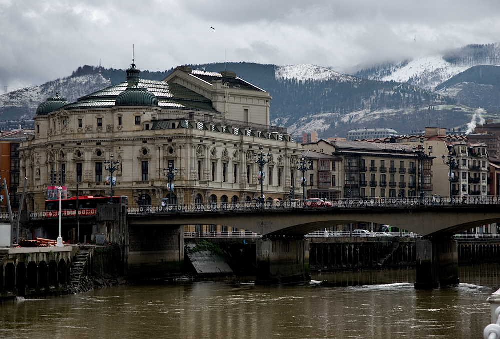 Ikuspegi arraroa azkenaldi honetan. Bilbao (Bizkaia)